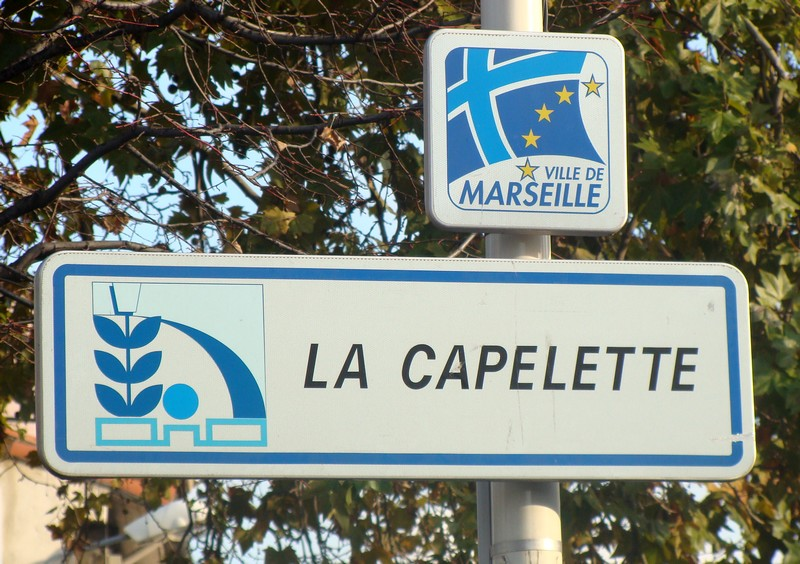 Panneau à l'entrée du quartier de la Capelette, à Marseille, 10e arr.